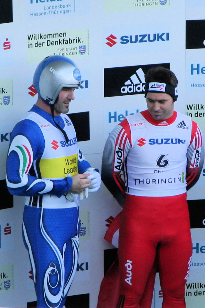 Armin Zöggeler und Stefan Höhener